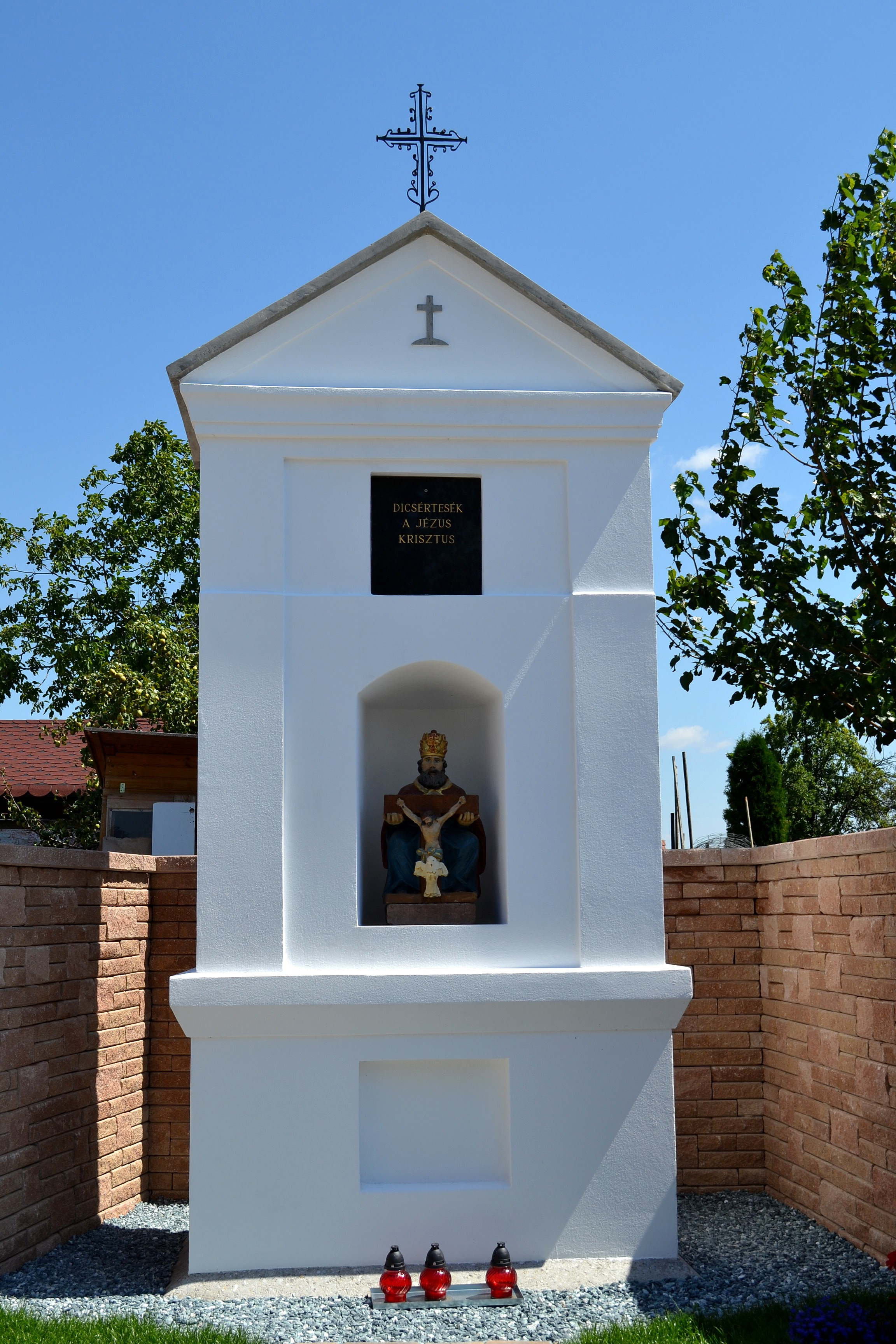 Božia muka v Kalinkove; celkový pohľad